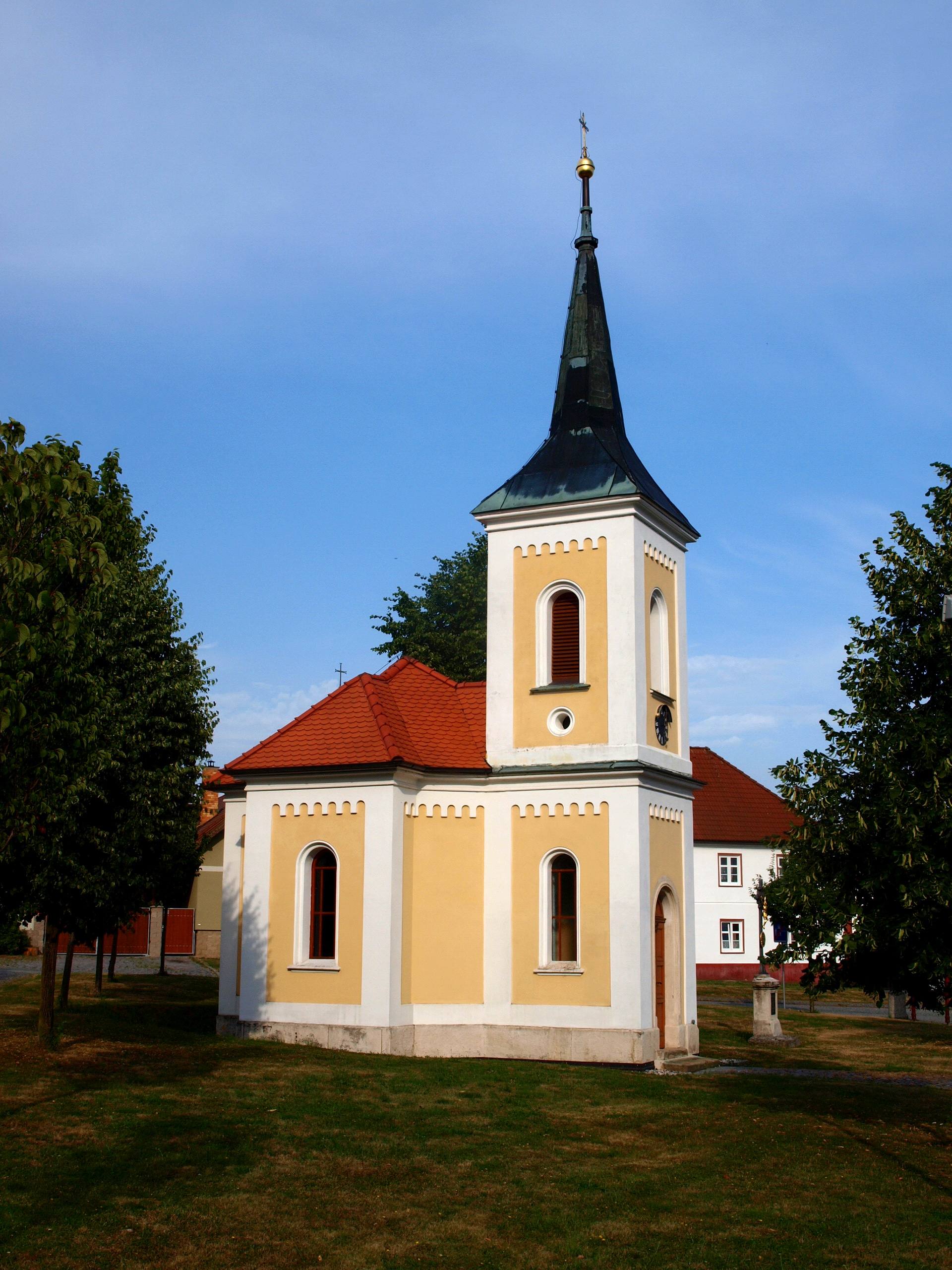 Kyšice, kaple sv. Floriána